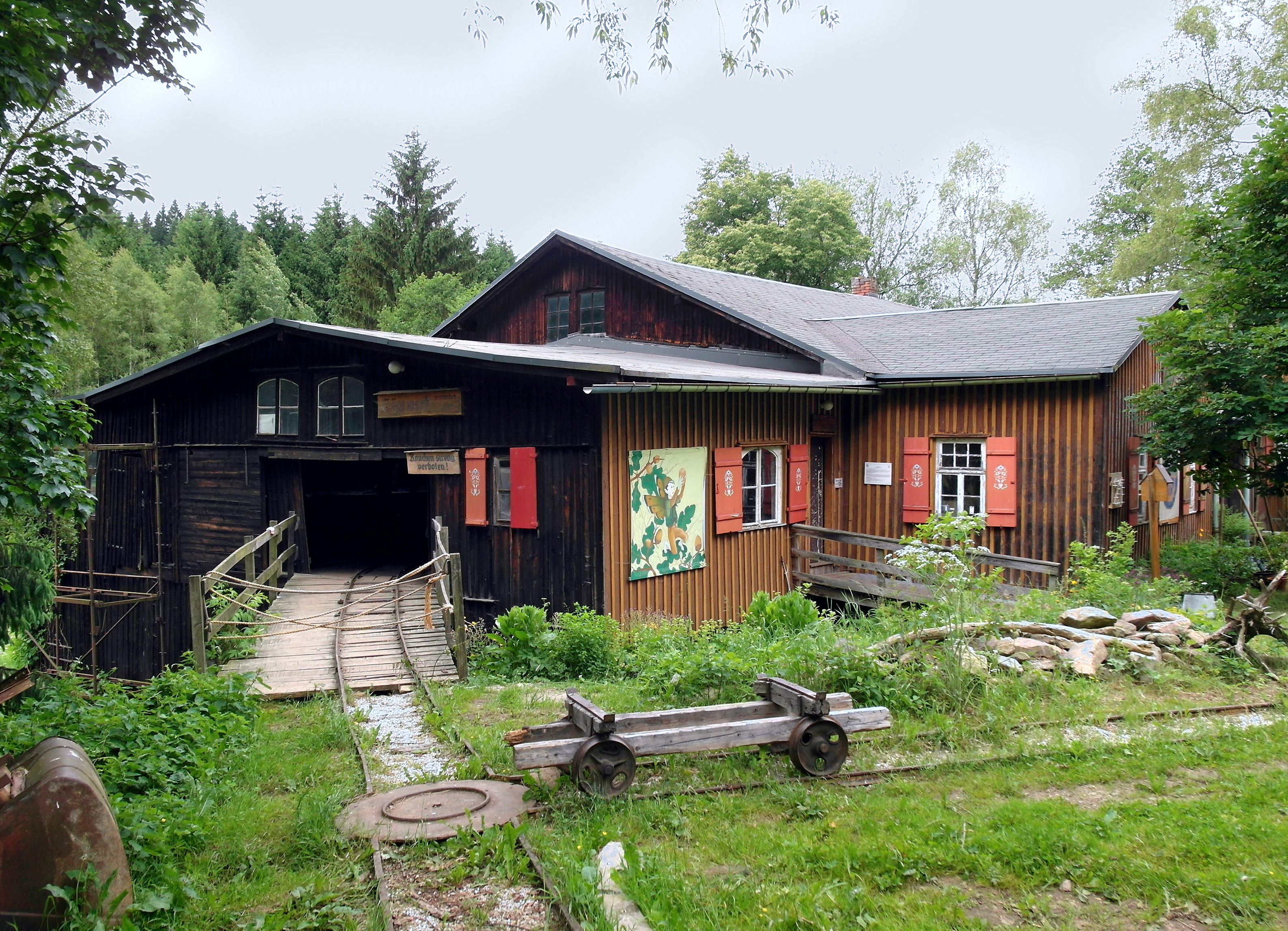 13.06.2017 01762 Reichenau (Hartmannsdorf-Reichenau), Gimmlitztal 103: Illingmühle (GMP: 50.774267,13.568495). Wassermühlen entstanden im Gimmlitztal schon kurz nach der Besiedlung des Erzgebirges. Die Sägemühle geht auf das Jahr 1791 zurück. Heutiger Bau von 1909. Der letzte Sägemüller, Kurt Illing, betrieb sie bis zu seinem Tode 1989. Heute Technisches Denkmal. Hier die Sägemühle mit Werksgleis und Drehscheibe. Straßenseite. [SAM0173.JPG]20170613160DR.JPG(c)Blobelt